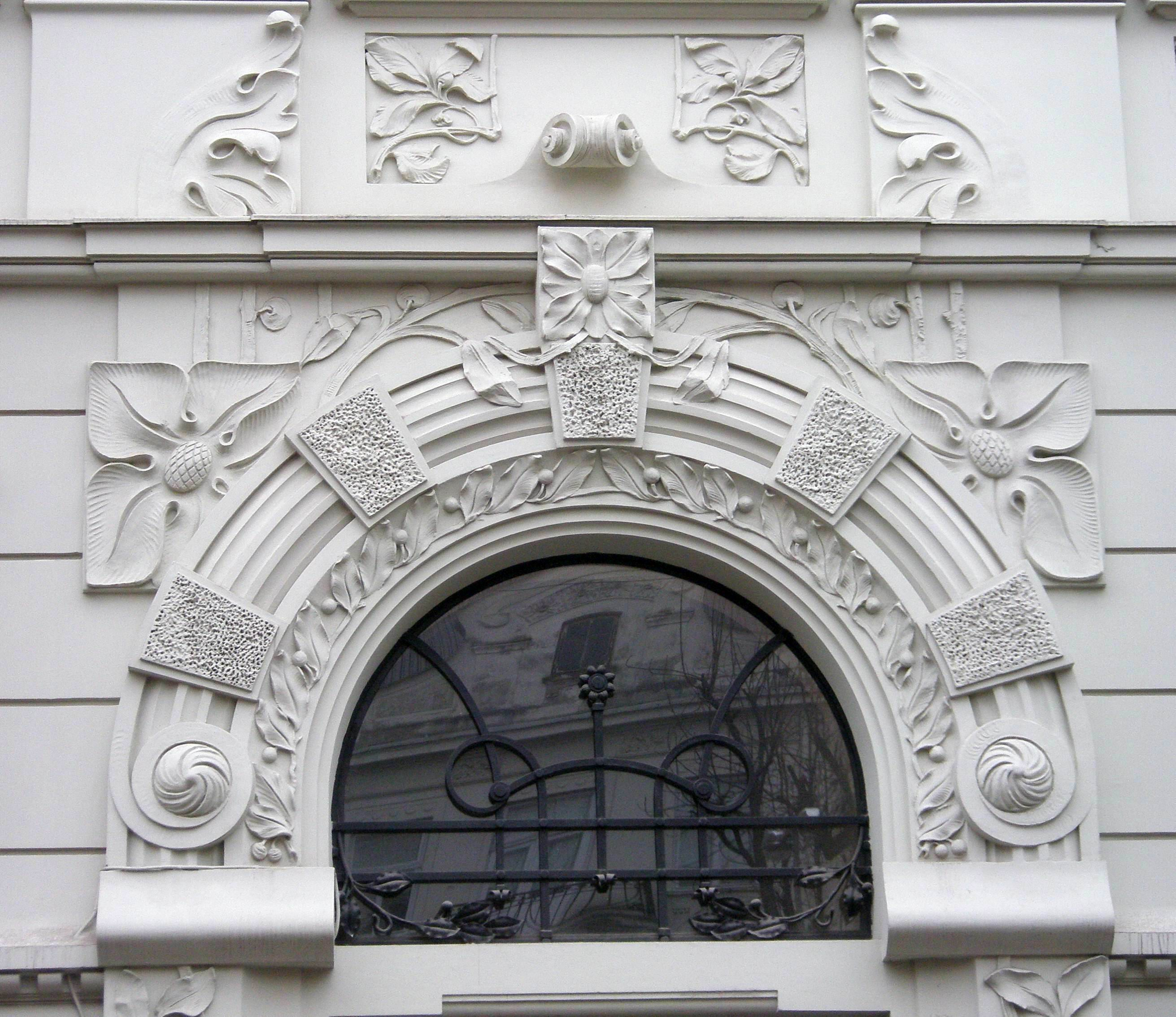 Фрагмент будинку в стилі сецесія. Богомольця, 6